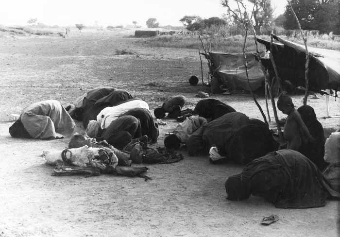 Het rituele gebed binnen de Islam wordt salat genoemd. Het zonsondergang of avondgebed, de maghrib, is het vierde gebed van de dag. In totaal zijn Moslims verplicht vijf dagelijkse gebeden te verrichten. De heer Broekhuijse heeft het gehele gebed op foto vastgelegd, de juiste volgorde waarop de foto's bezien moeten worden is: 20010324, 20010323, 20010321, 20010320 en 20010322.